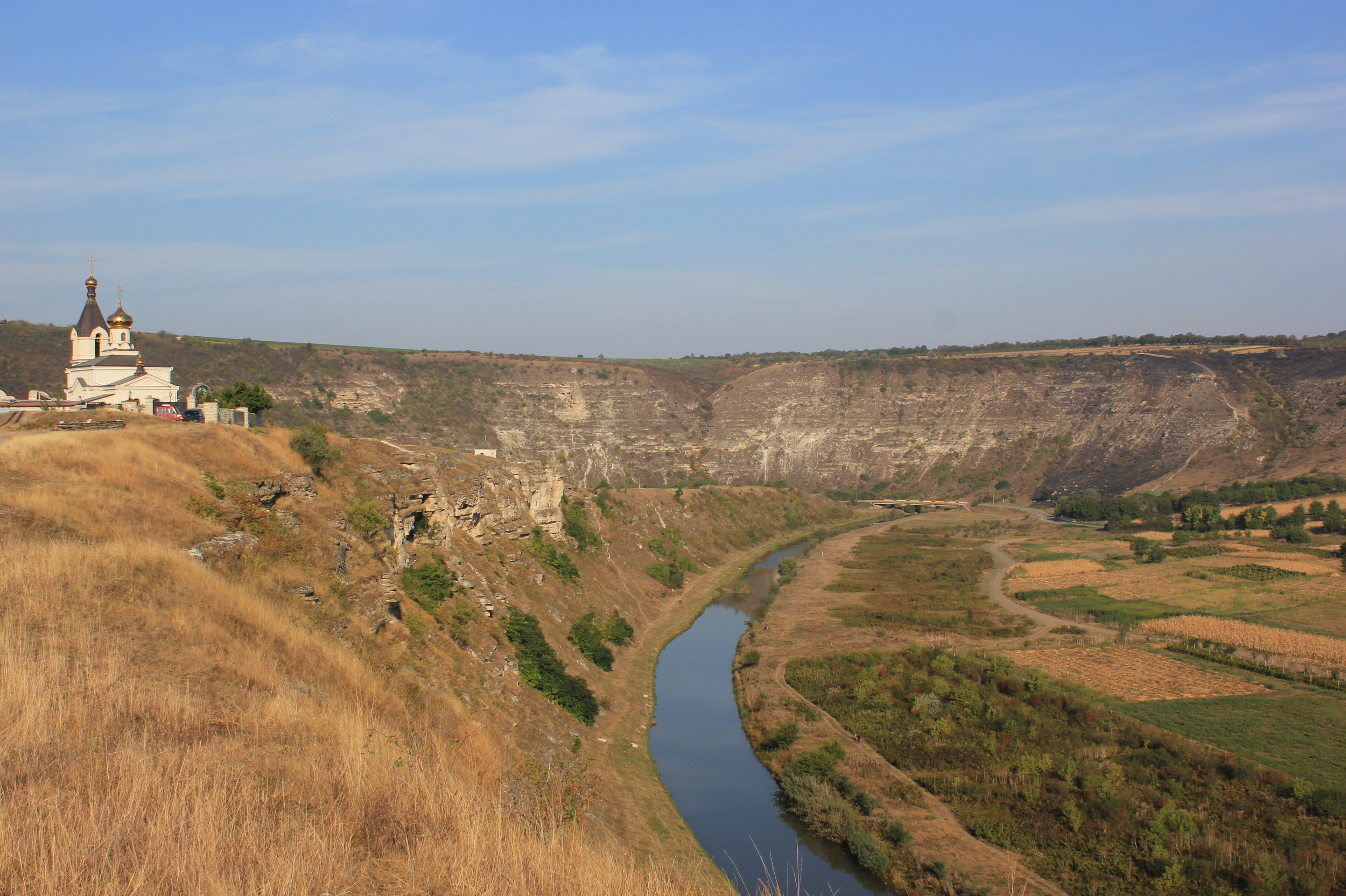 Hornjoserbsce: Wudrjeńca rěki Raut pola Orhei Vechi, stareho klóštra, zapisaneho do swětoweho kulturneho herbstwa UNESCO.